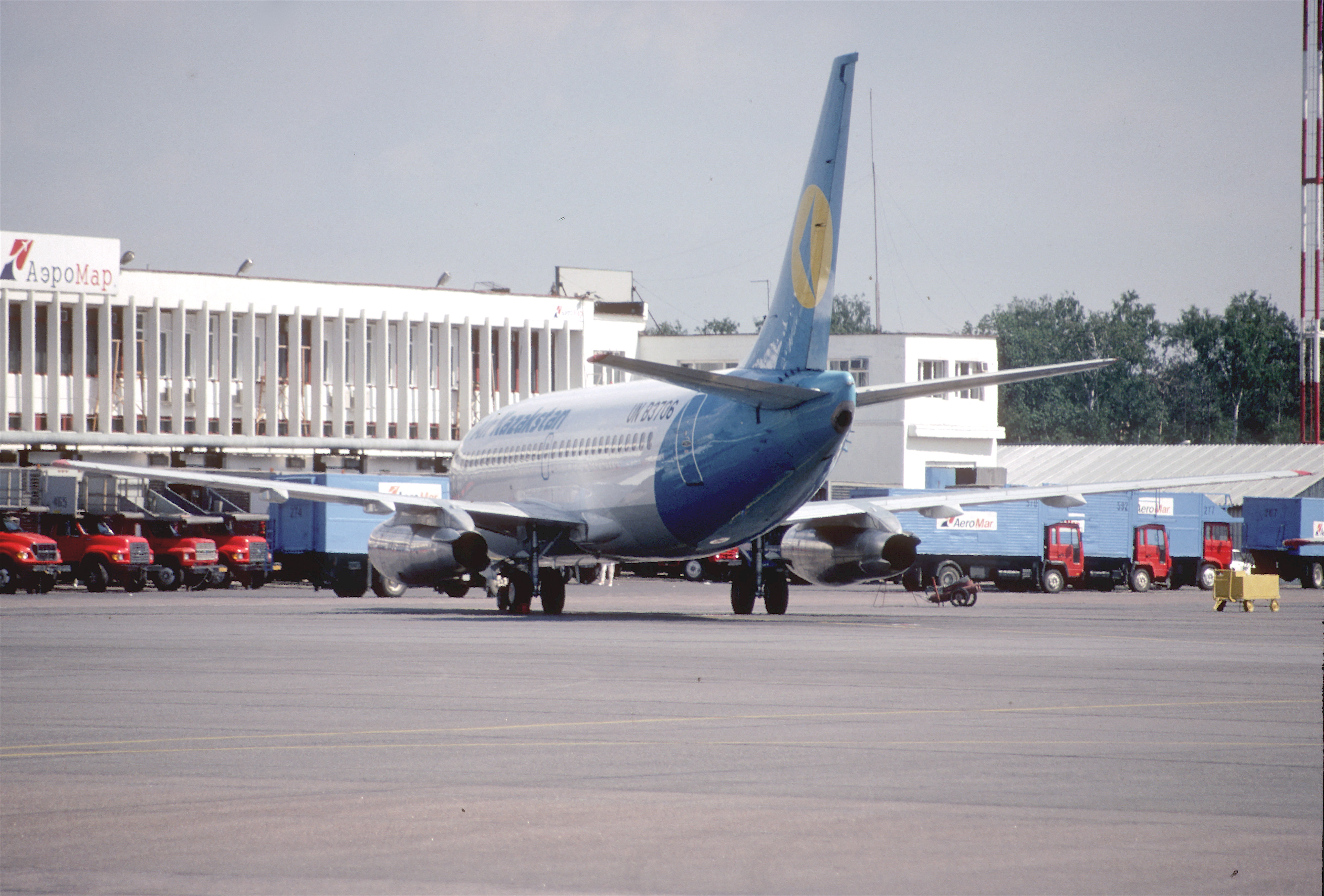 138af - Air Kazakstan Boeing 737-2M8; UN-B3706@SVO;15.07.2001